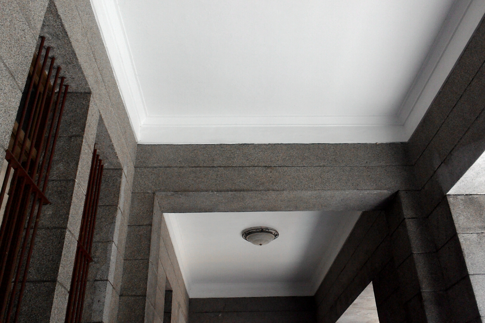 三井物產株式會社舊廈騎樓天花板,台北市中正區城內次分區黎明里